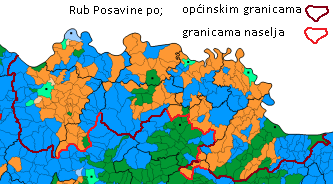 Etnička slika Posavine 1991., s postojećim i predloženim granicama općina